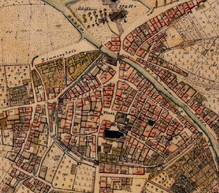 Kartenausschnitt Urkataster Bayern, Altstadt Marktbreit